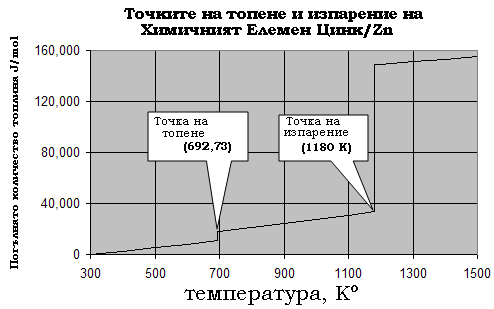 Специфична топлина на топене